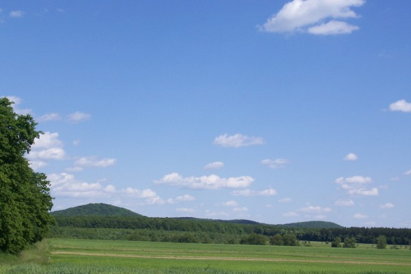 Вид на Богит та хребет